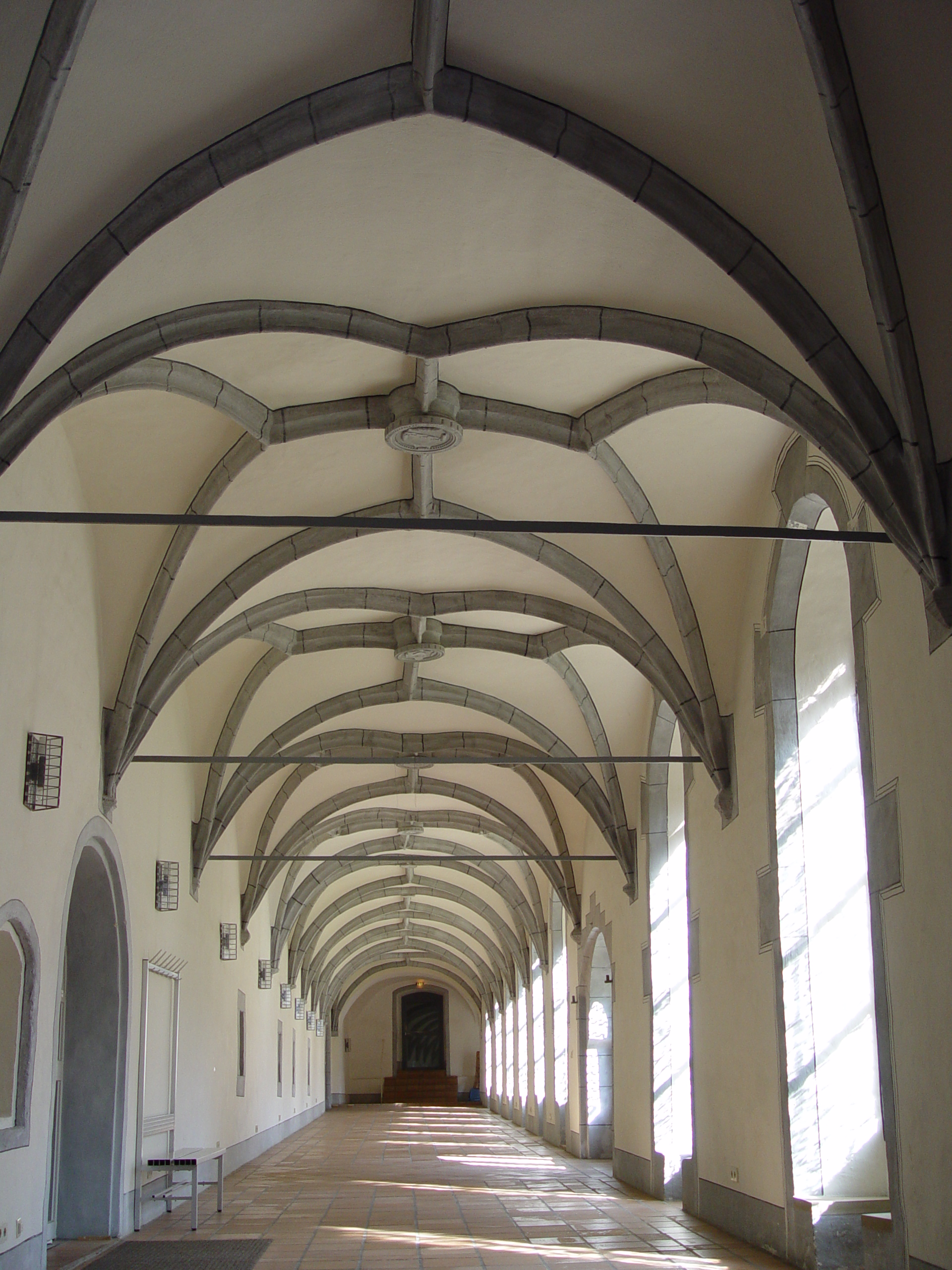 Kreuzgang im Kloster Wald, Baden-Württemberg, Deutschland